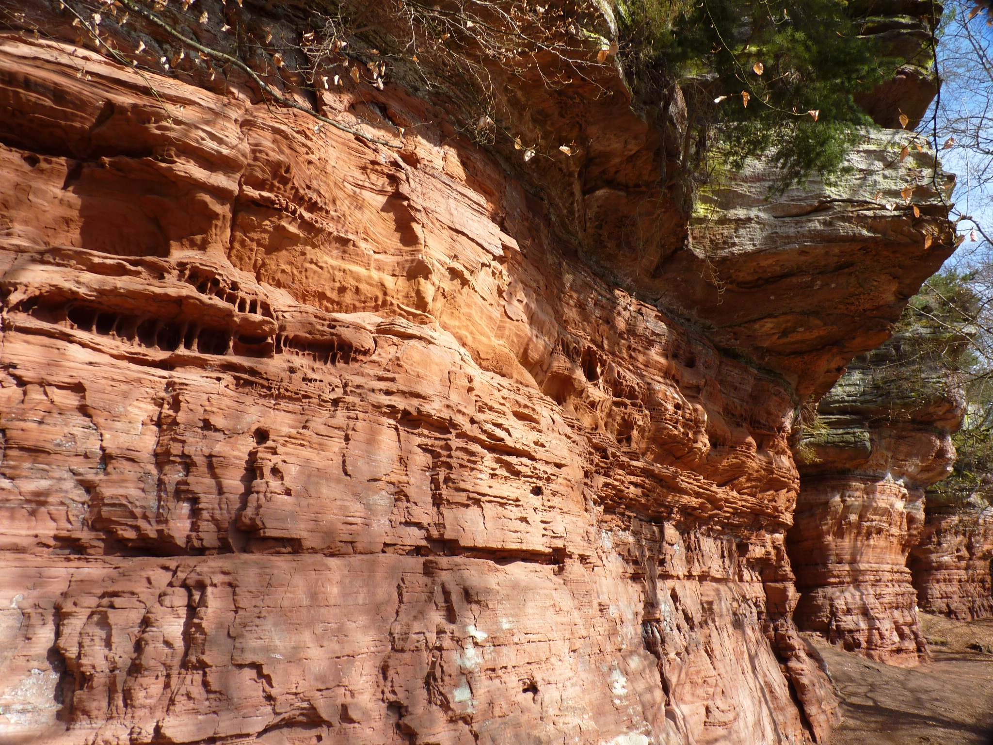 Blick entlang der Felsgruppe Altschlossfelsen bei Eppenbrunn